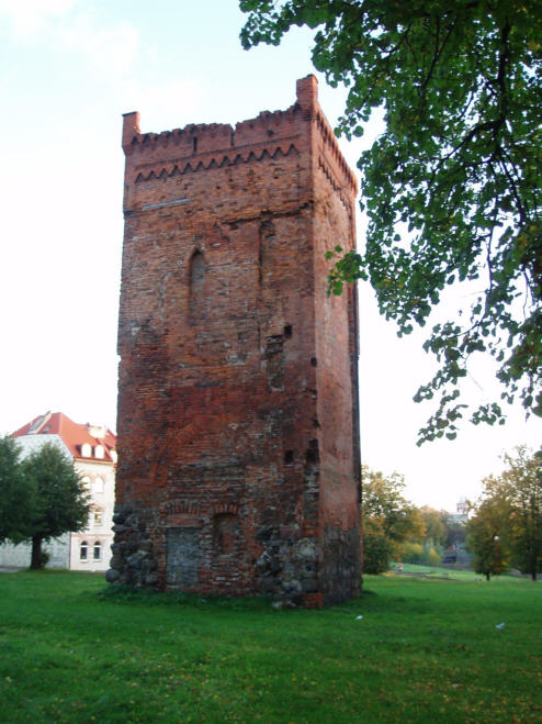 Braniewo, wieża bramna z kaplicą